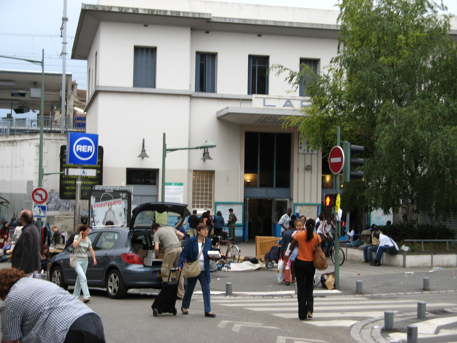 gare de Laplace, RER B, France